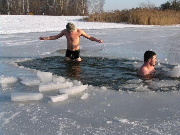 Kąpiel w przeręblu, który został wykuty na głębokości około 1 metra. Autor: Marek Radziszewski